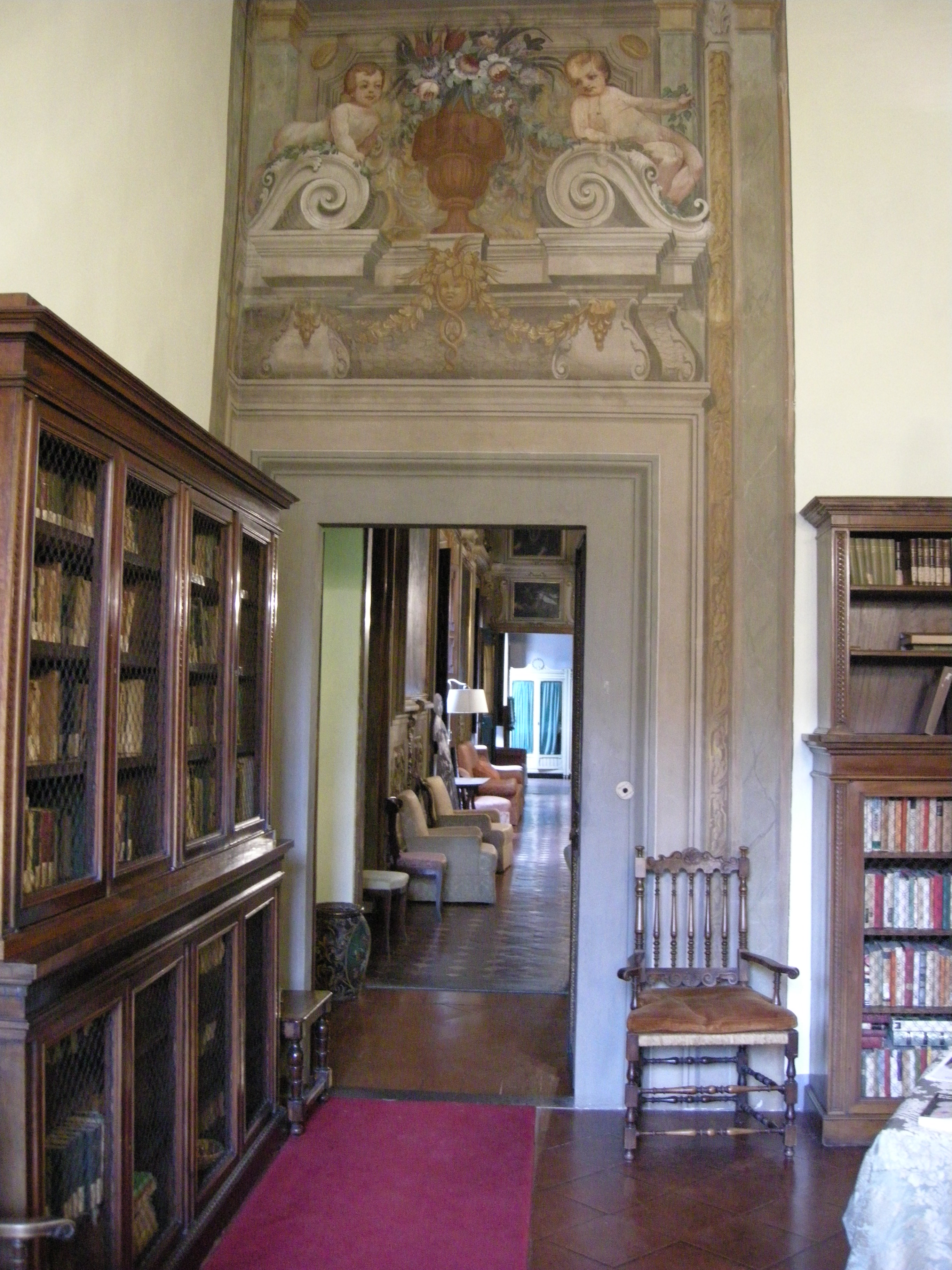 Palazzo giugni sala 3 10.1